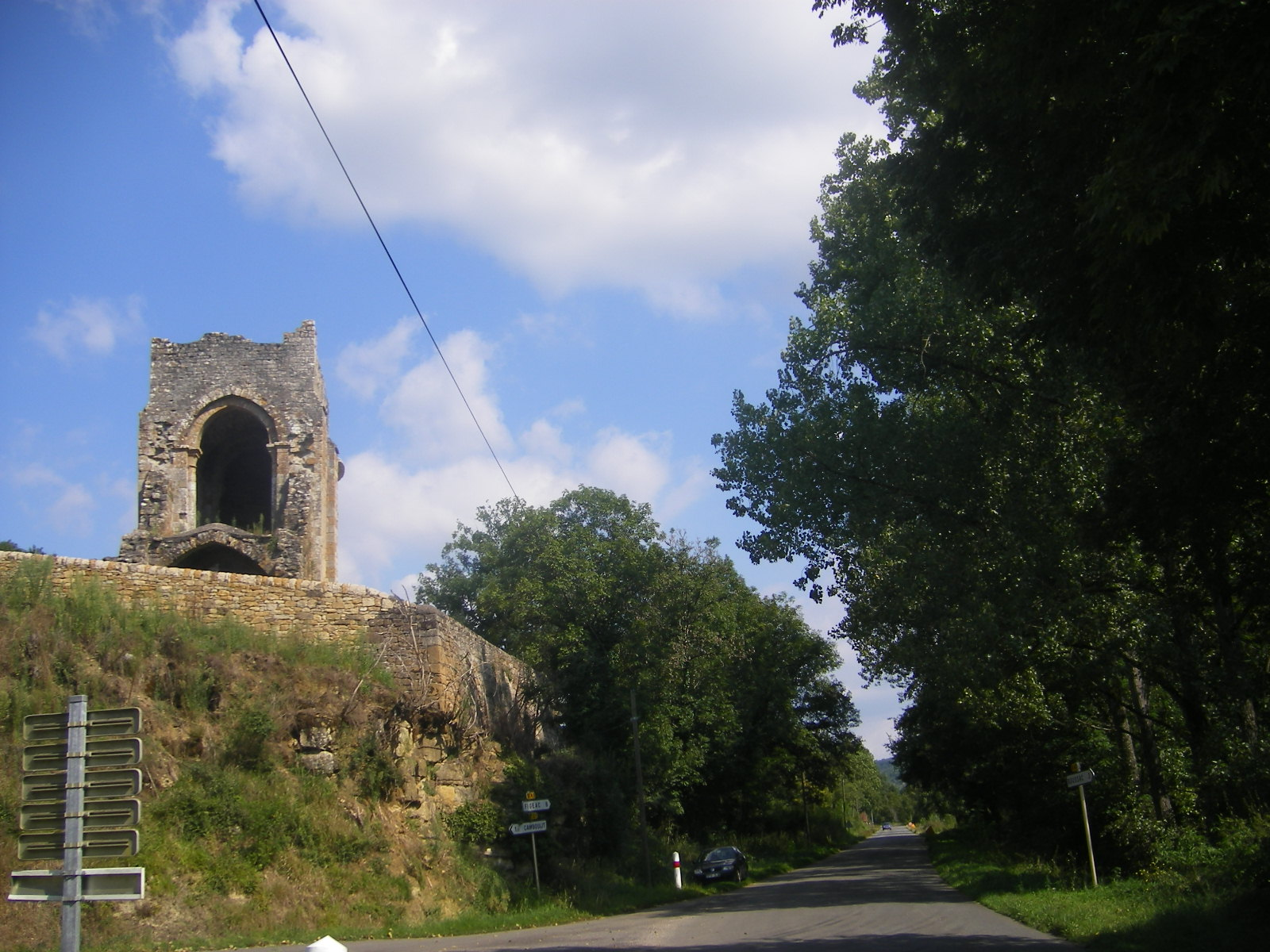 Camboulit Chapelle Saint Martin au cimetière